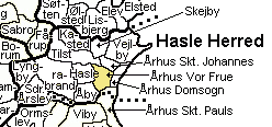 Vor Frue Sogn, Århus, Hasle Herred, Århus Amt